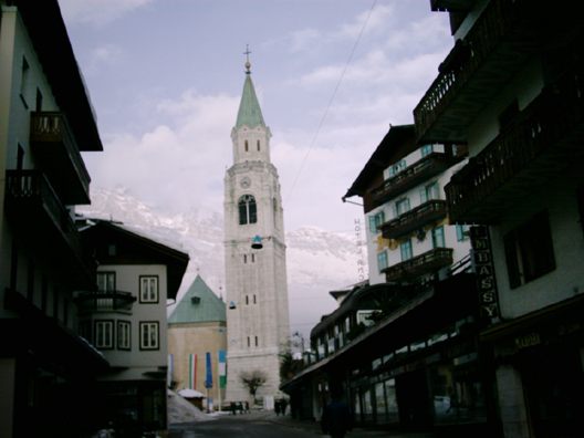 Veduta di Cortina D'Ampezzo.